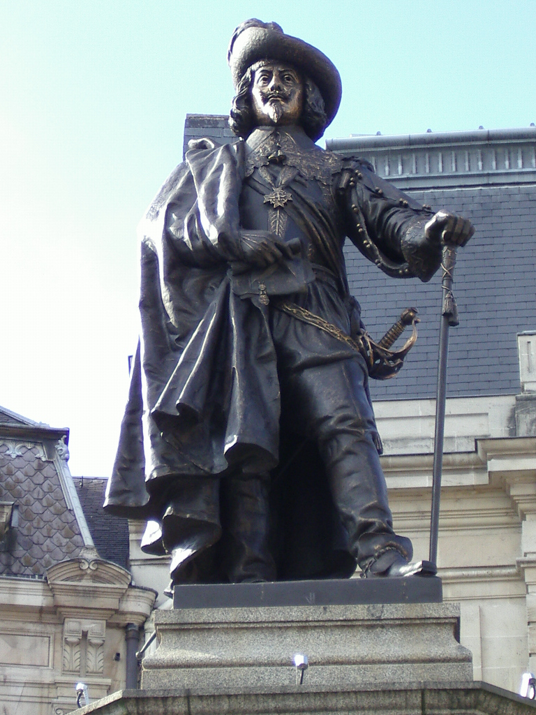 Statue Charles de Gonzague Charleville-Mézières France